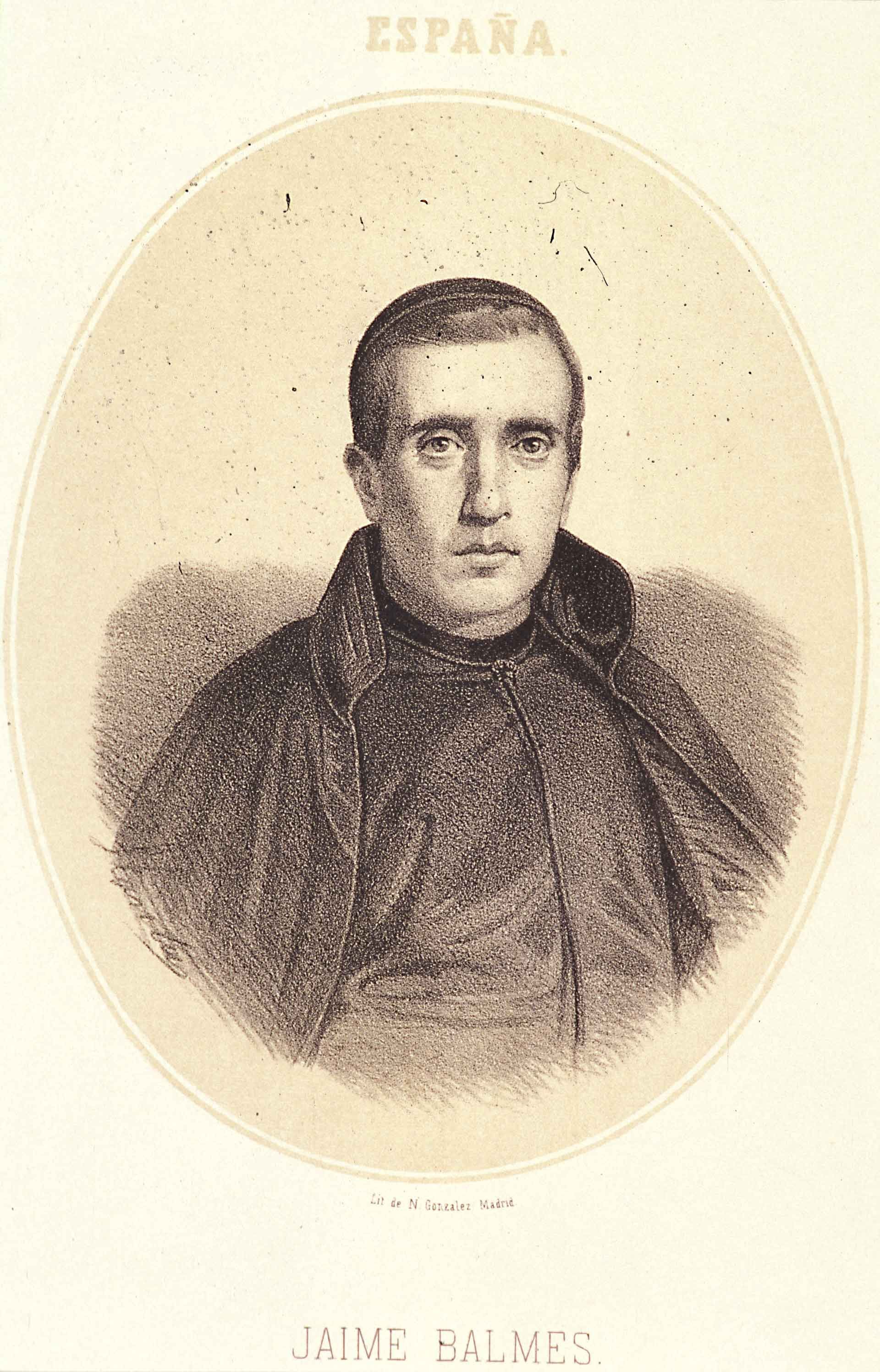 Retrato de Jaime Balmes